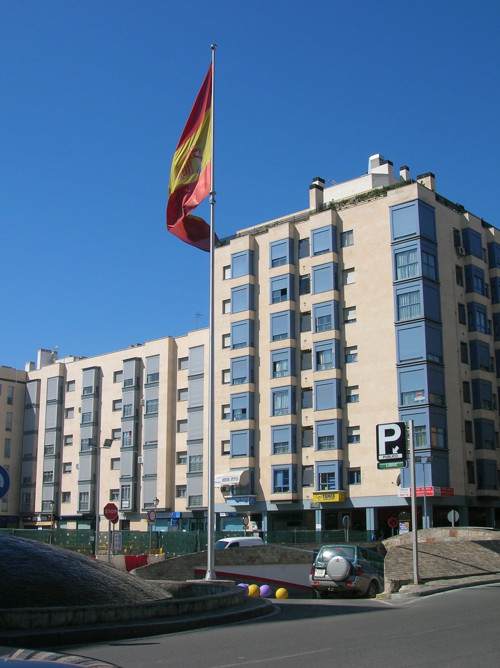 Bandera de España situada en la Plaza de España, en Torrejón de Ardoz.